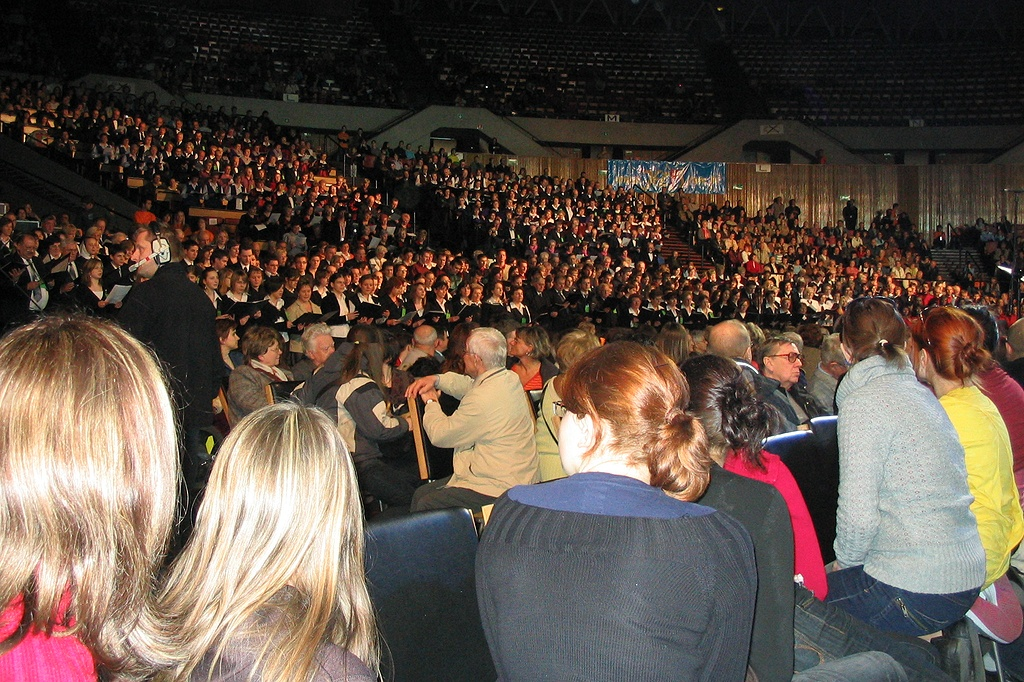 ProChrist 2008, Katowice